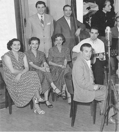 In primo piano il maestro Angelini, dietro da sinistra Nilla Pizzi, il Duo Fasano e un musicista dell’orchestra; in piedi Achille Togliani e un altro musicista